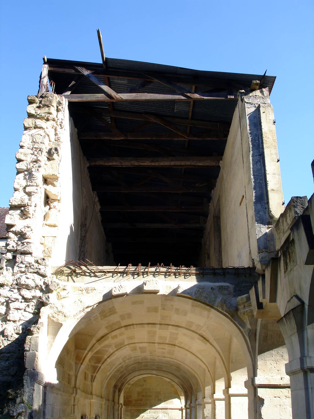 Abbaye Notre-Dame du Val, étage de la galerie du cloître, Mériel (Val-d'Oise), France.